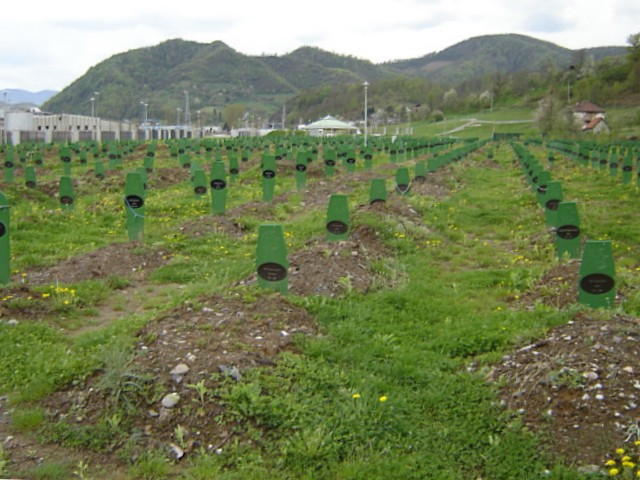 Srebrenica Potocari Memorial